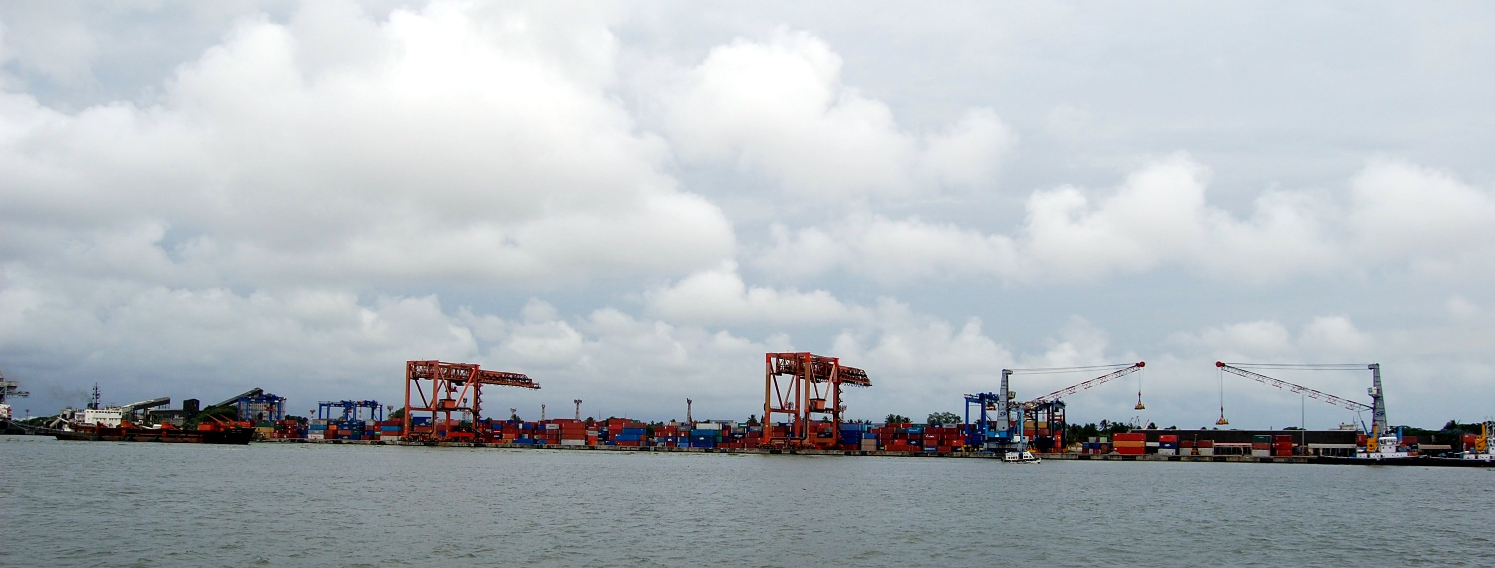 Kochi container terminal